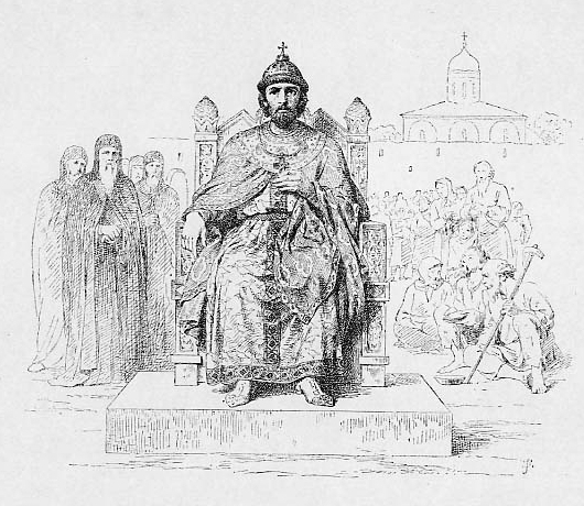 Великий Князь Константин Всеволодович. 1212-1219 г.Считая себя обиженным и не примерясь с потерей старшинства, Константин Всеволодович, отняв великое княжение у брата Юрия, правил постоянно радея о благоустроении дел церковных и гражданских. Конец жизни провел в делах милосердия, среди монахов и нищих.